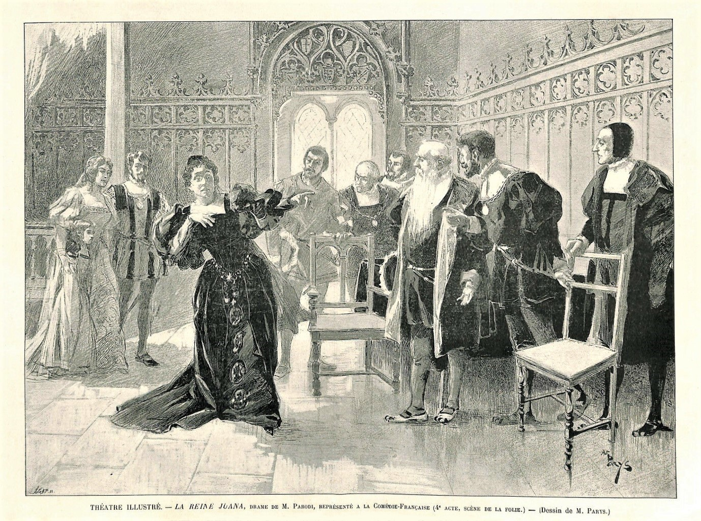 La Reine Juana, drame en 5 actes d'Alexandre Parodi créé à la Comédie-Française. Illustration d'A. de Parys publiée dans Le Monde Illustré (1893).